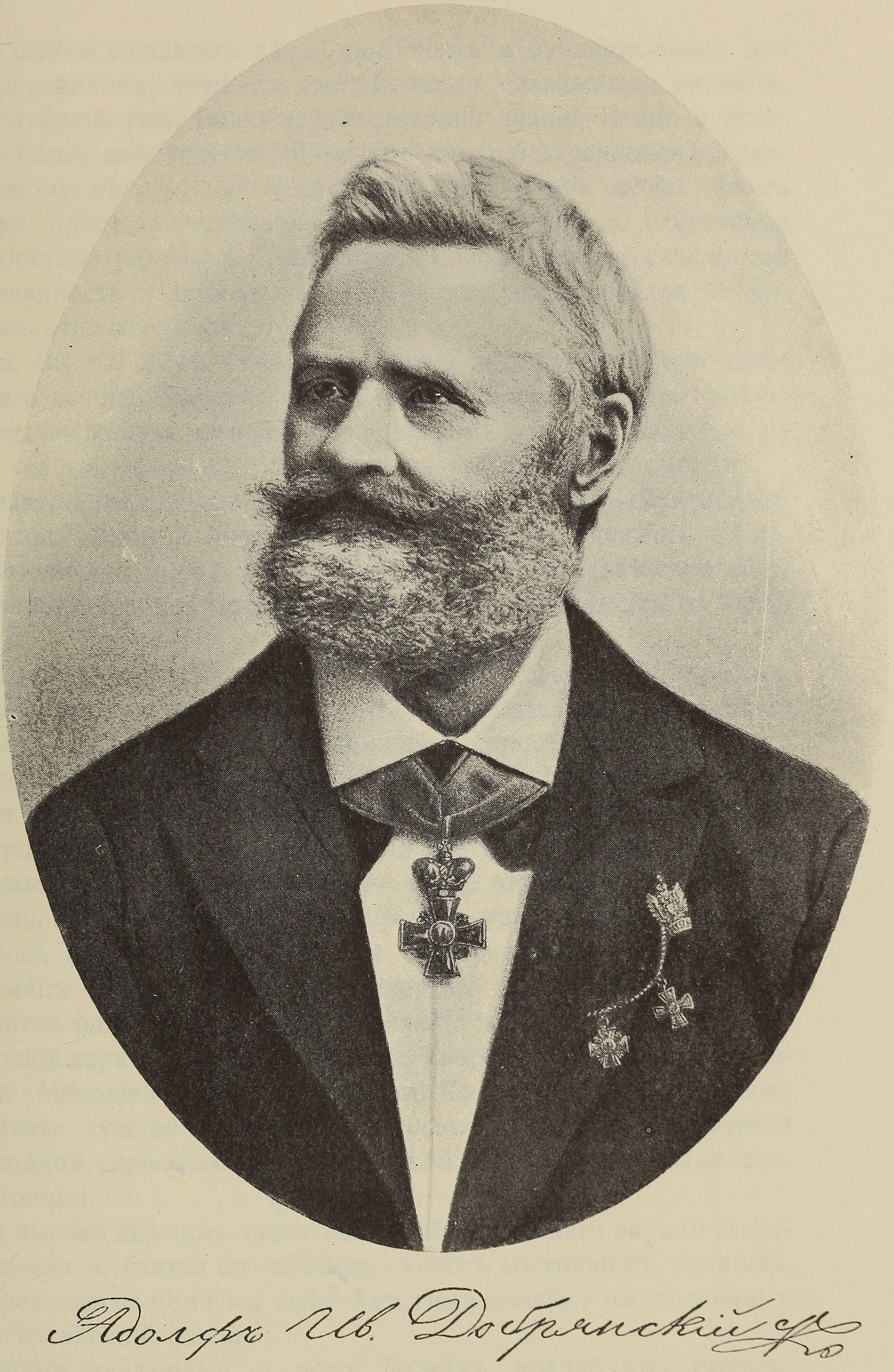 Адольф Добрянский